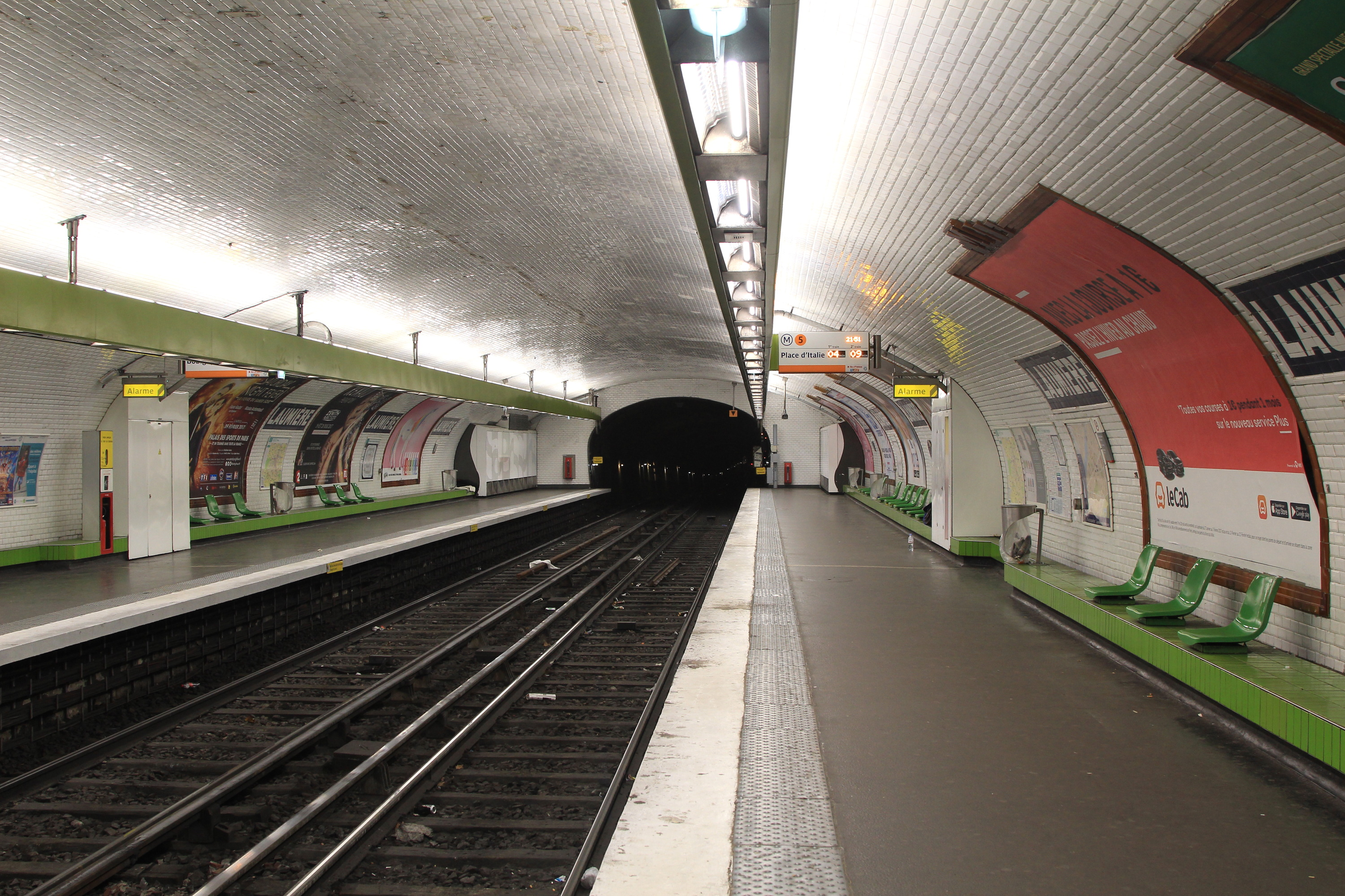 Vue en direction de Place d'Italie depuis les quais de la station Laumière du métro de Paris.